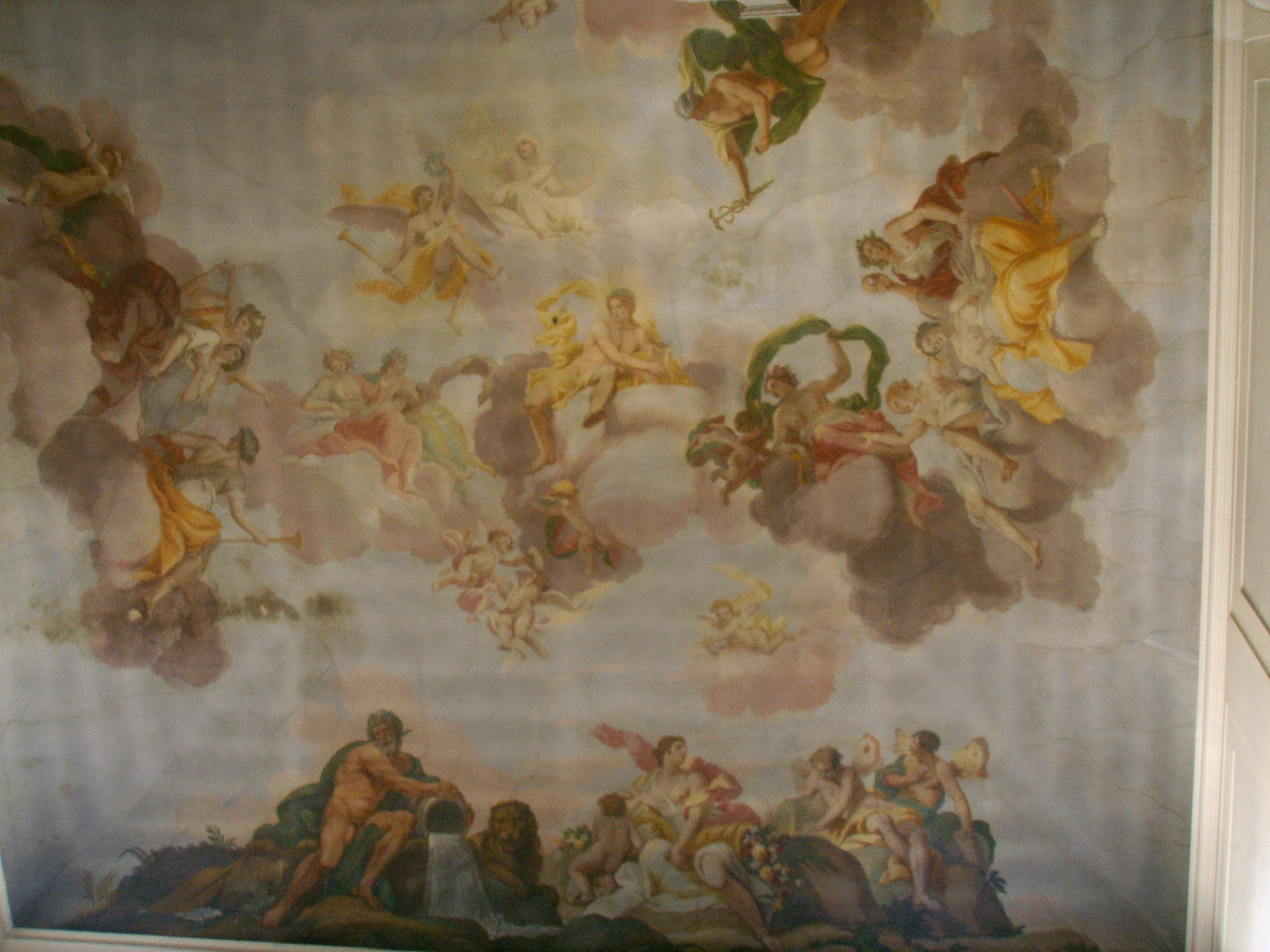 Palazzo Cocchi Serristori in Florence, italy